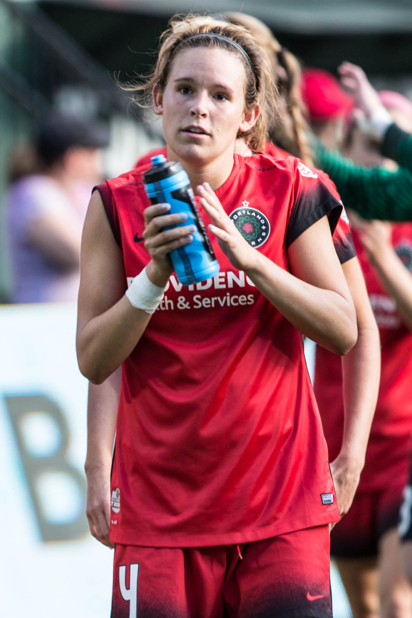 N42A3221.jpg